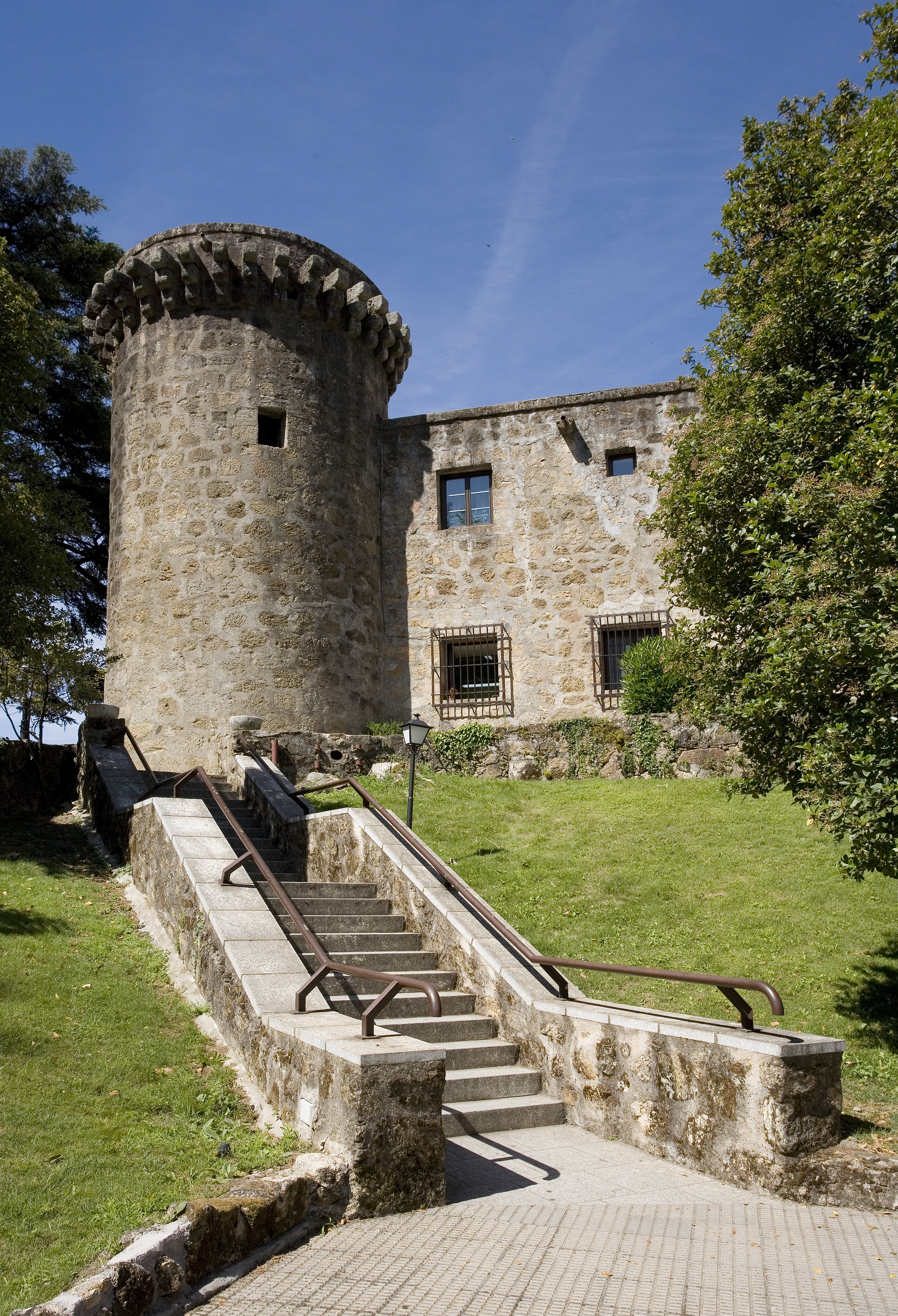 Parador de Jarandilla 1.jpg